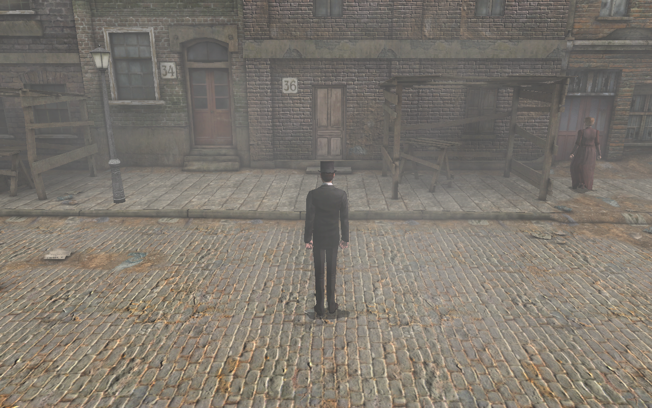 Capture d'écran du jeu Sherlock Holmes contre Jack l'Éventreur. Capture réalisée devant le 36, Middlesex en vue à la troisième personne (le joueur voit le personnage qu'il contrôle).